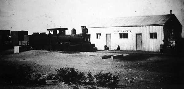 La locomotora N° 3 en cargo de un tren en la estación vieja Puerto Madryn.